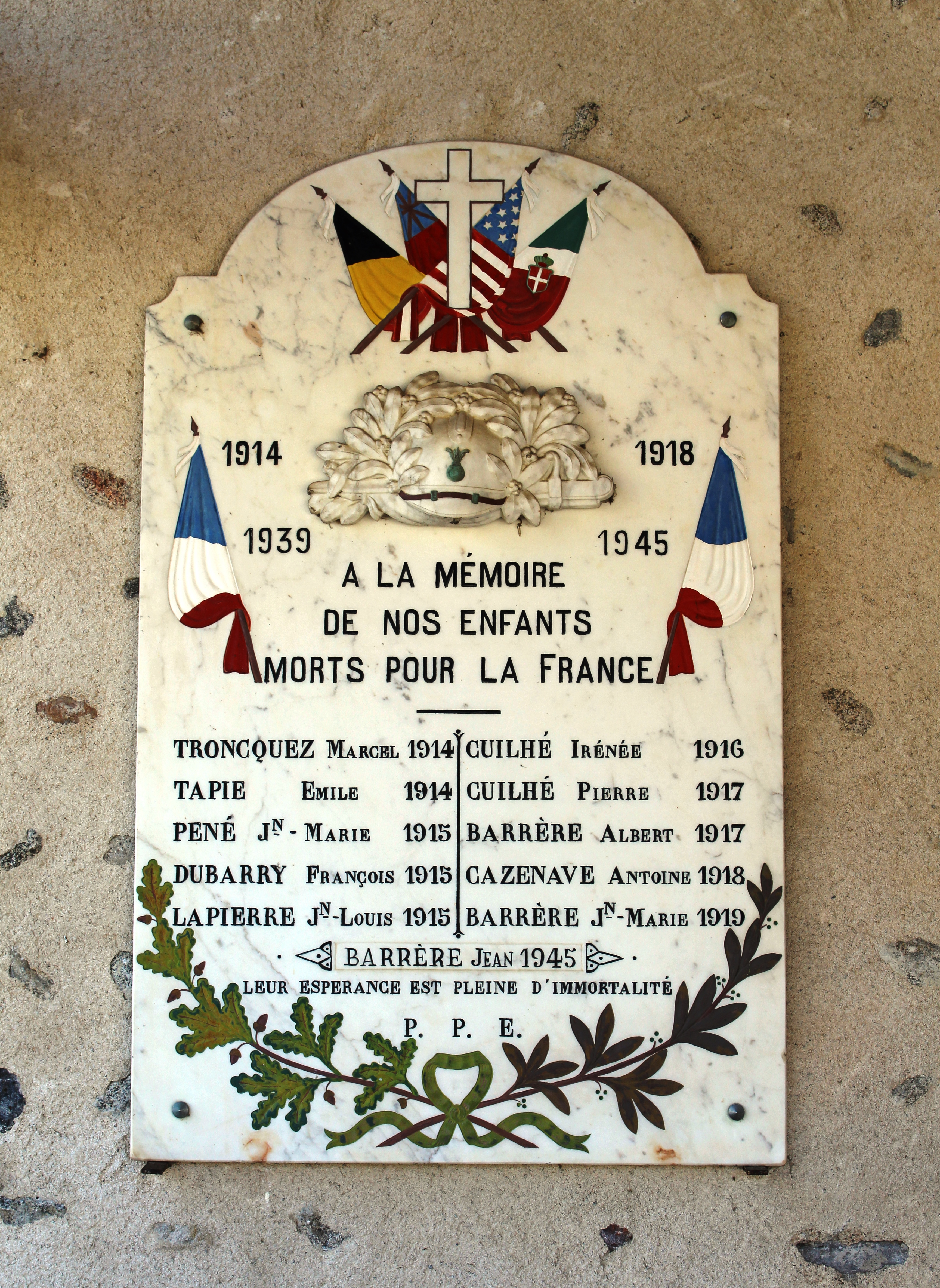 Monument aux morts de Hiis (Hautes-Pyrénées)